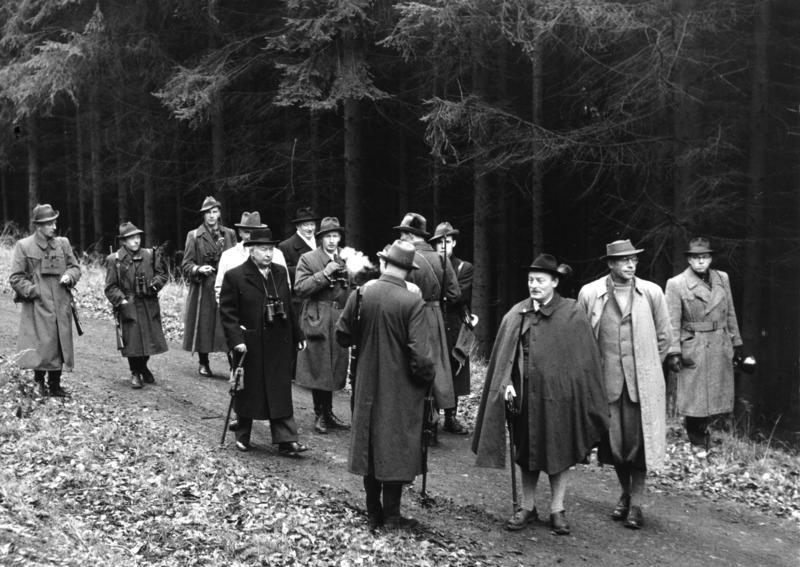 19.12.1953 Diplomatenjagd mit Bundespräsident Prof. Heuss bei Springe/Hannover